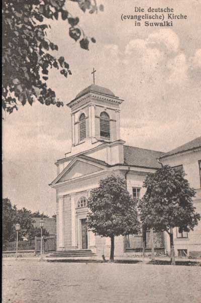 Kościół Świętej Trójcy (ewangelicko-augsburski) w Suwałkach